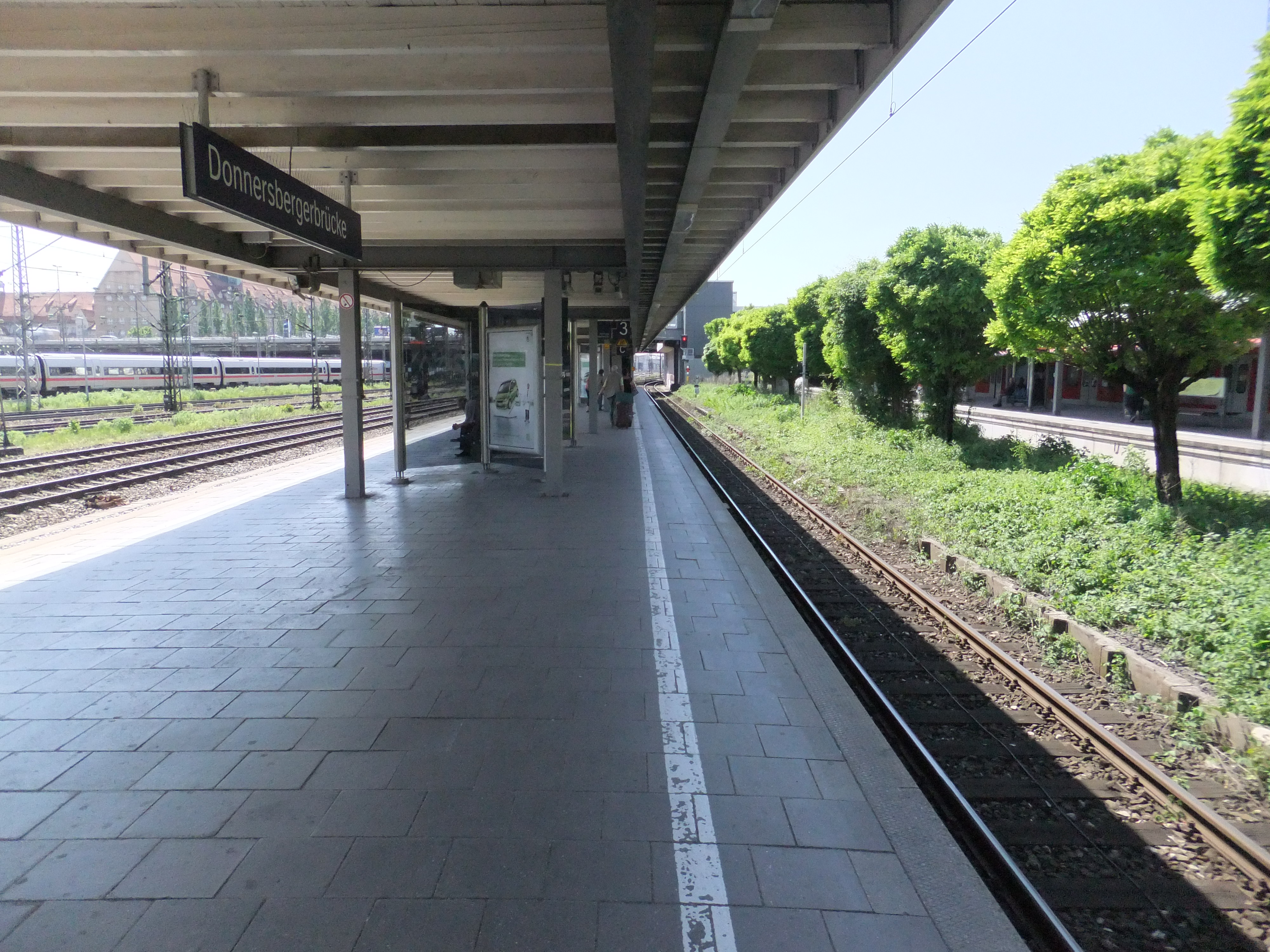 Bahnsteige des Bahnhofs München Donnersbergerbrücke